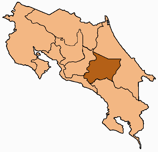 Mappa della diocesi di Cartago, in Costa Rica. Lavoro personale, eseguito a partire da questa immagine di Commons. Fonte per i confini delle diocesi